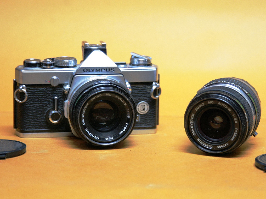 Coll. Marcè CL - Olympus OM1 1973, reflex manuale, dimensioni 136 × 83 × 50 mm e peso 510 g, con tendine in seta gommata a scorrimento orizzontale esposimetro tipo TTL (CdS), innesto con baionetta Olympus OM[1]